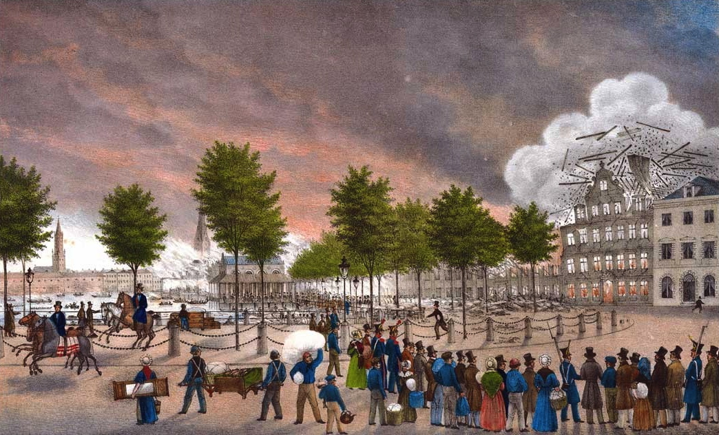 Jungfernstieg Hamburg, Sprengung des Hauses von Salomon Heine bei dem Hamburger Brand 1842. Zeichnung von Cornelius Suhr, gedruckt von Peter Suhr.